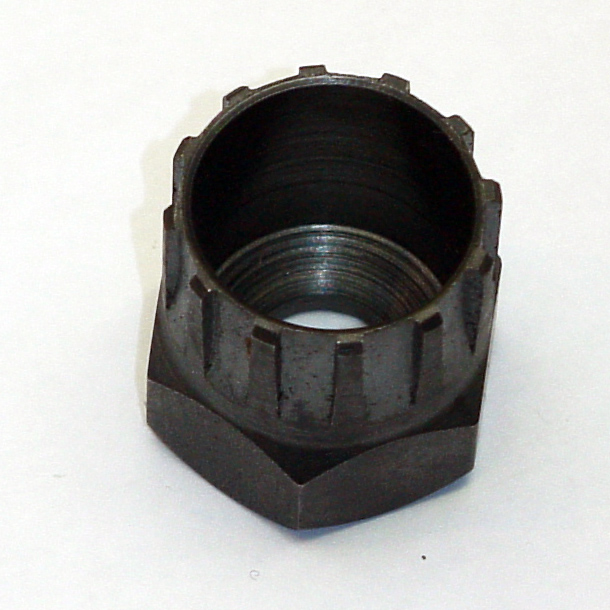 Fahrradtechnik